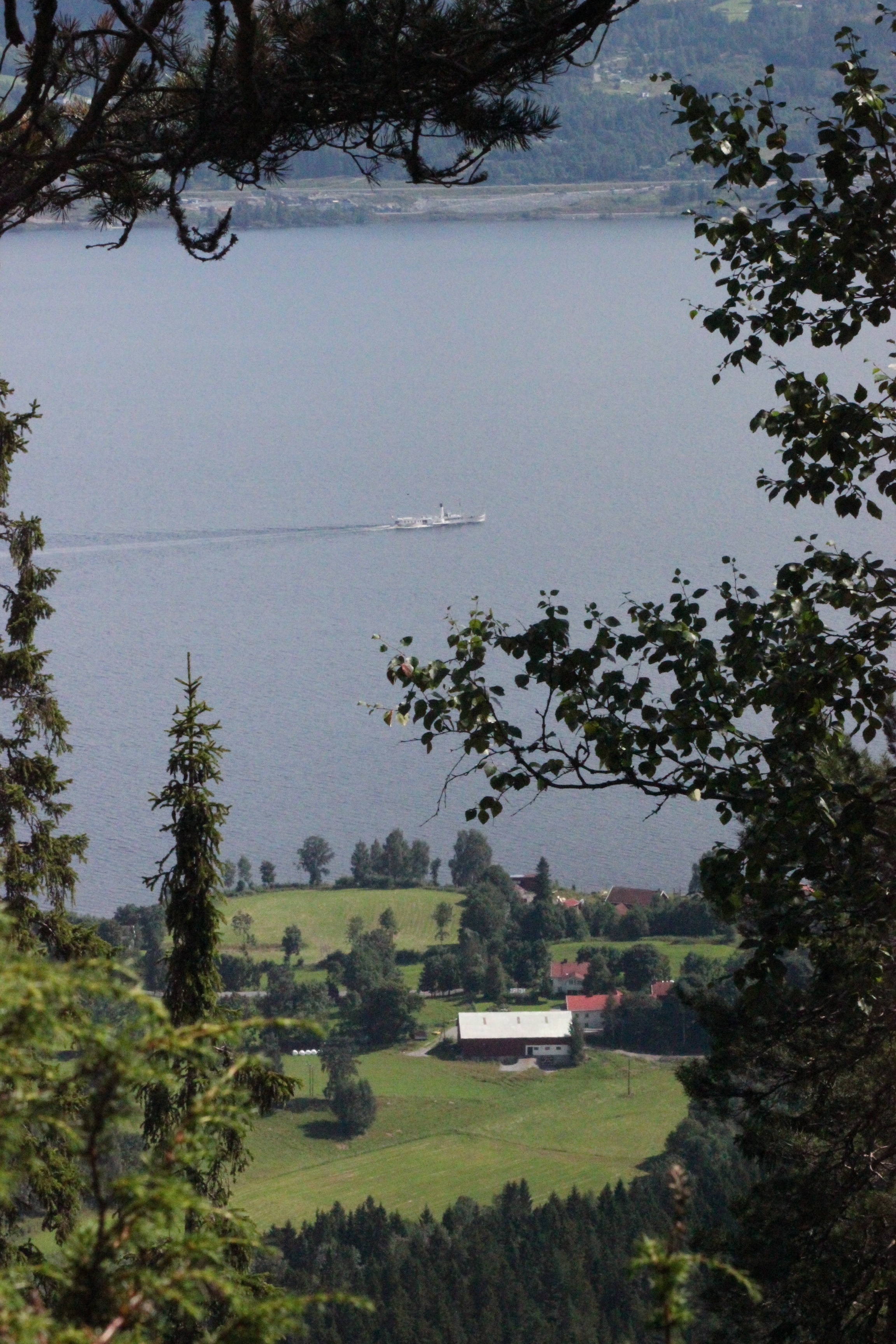 Gården torgunrud i Feiring, sett fra Stefferudkollen. I bakgrunnen hjuldamperen Skibladner og Morskogen.